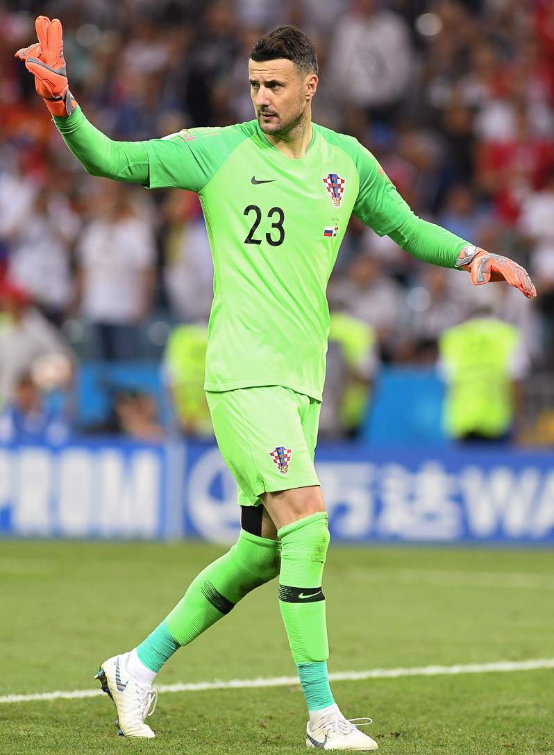 Сборная России заканчивает ЧМ-2018 с поднятой головой. Хорватия выходит в полуфинал